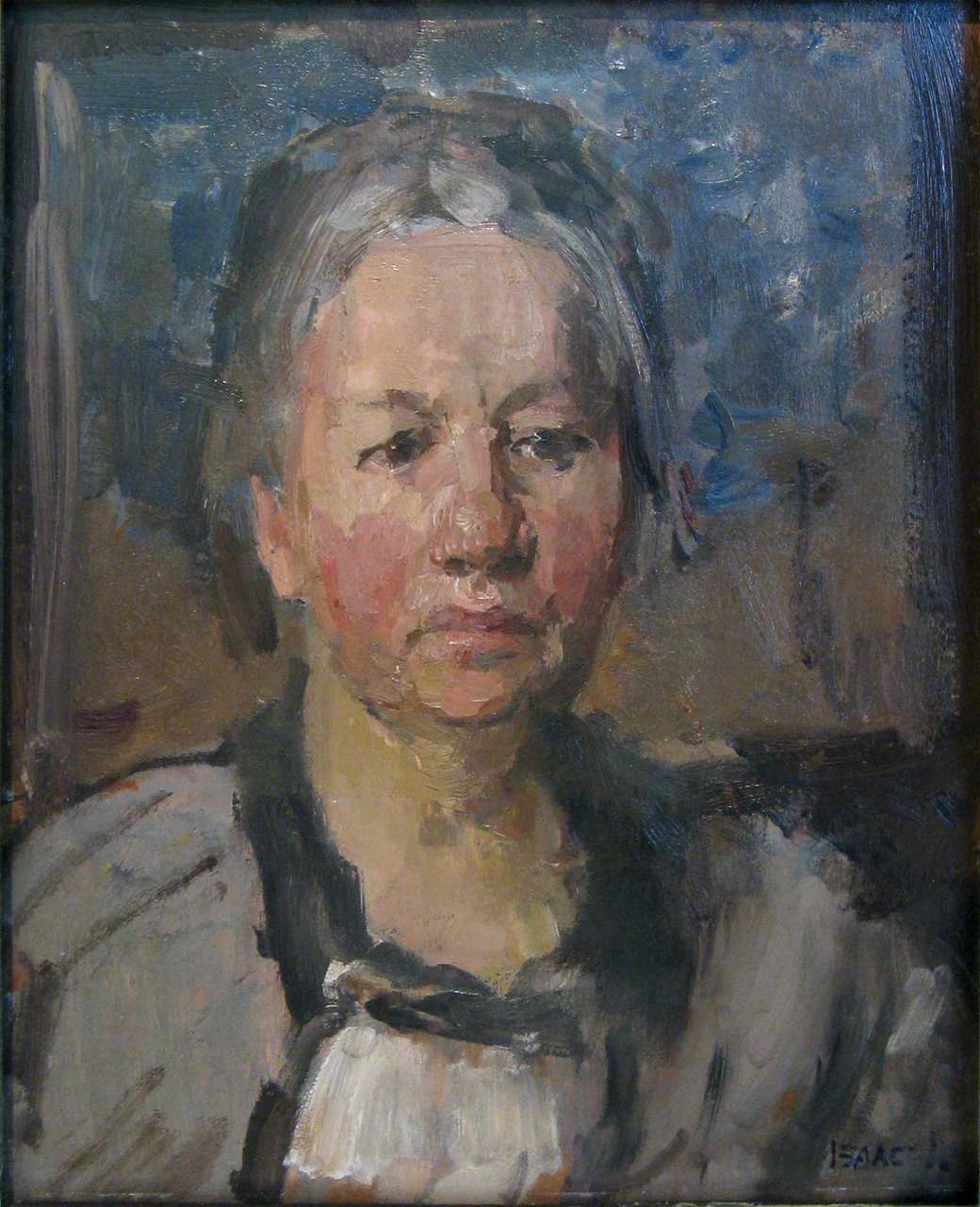 Portret van Johanna van Gogh-Bonger